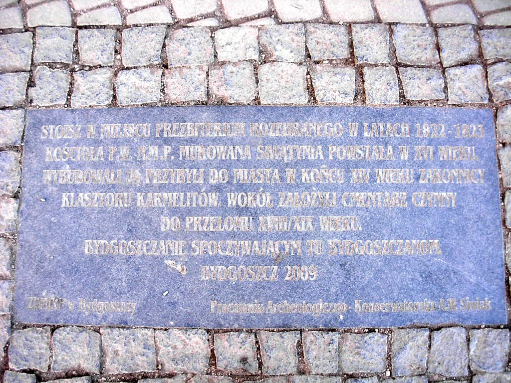 Tablica pamiątkowa w bruku ul. Mostowej w miejscu prezbiterium dawnego kościoła mariackiego karmelitów w Bydgoszczy